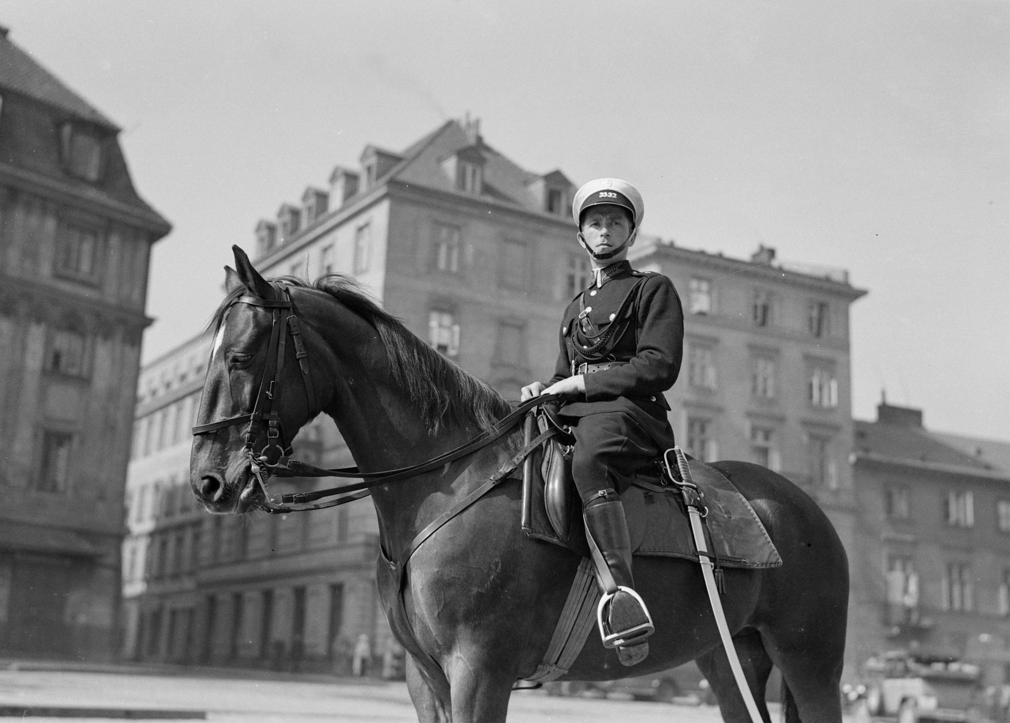 Collectie / Archief : Fotocollectie Van de Poll